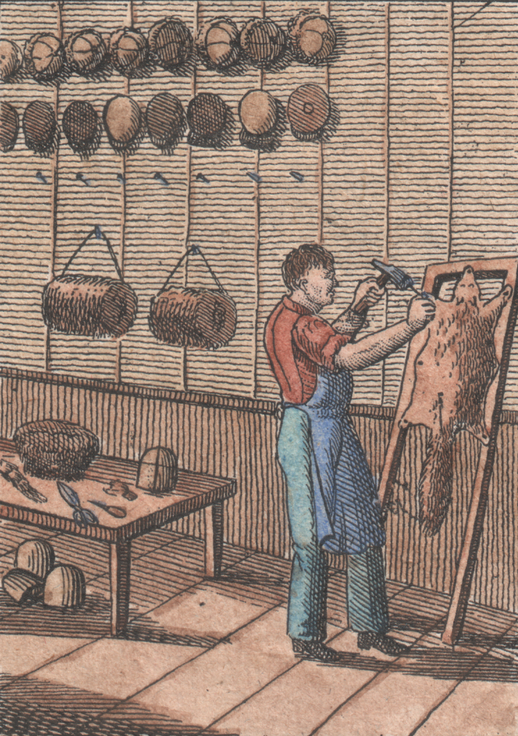 Kürschner. 196. Aus: Orbis Pictus. Federlitho 1832-42. 6,7 x 9,3 cm.